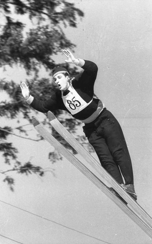 Zentralbild Schaar-Wlocka /30.1.1955/ VI. Wintersportmeisterschaft der DDR in Oberhof. Am Nachmittag des 29.1.1955 wurde auf der Jugendschanze der Kombinationssprunglauf der Jugend durchgeführt. UBz: Den zweiten Platz der männlichen Jugend I belegte Helmut Recknagel SC Motor Jena, mit Sprüngen von 40 und 41,5 Metern. Gesamtnote: 444,6. Beim Spezialsprunglauf am 30.1.55 wurde er DDR Meister.